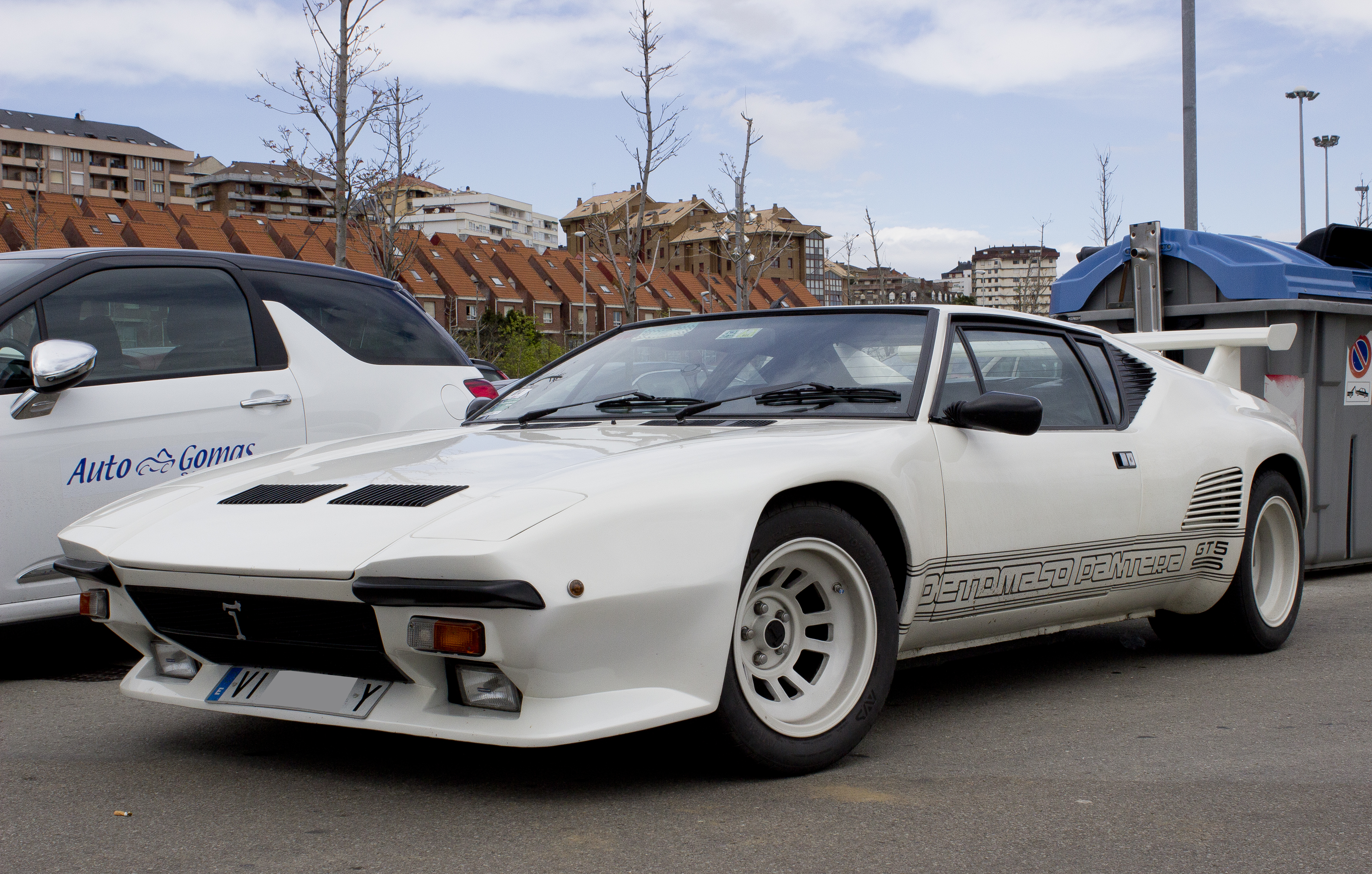 De Tomaso Pantera GT5-S